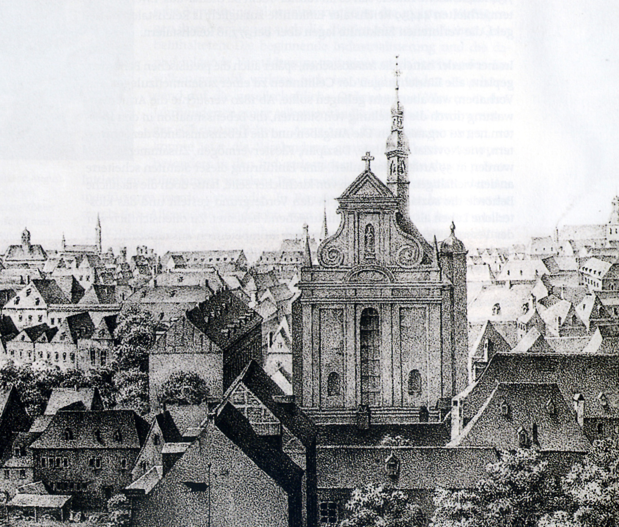 Köln, St. Maria in der Kupfergasse und Umgebung im ersten Drittel des 19. Jahrhunderts